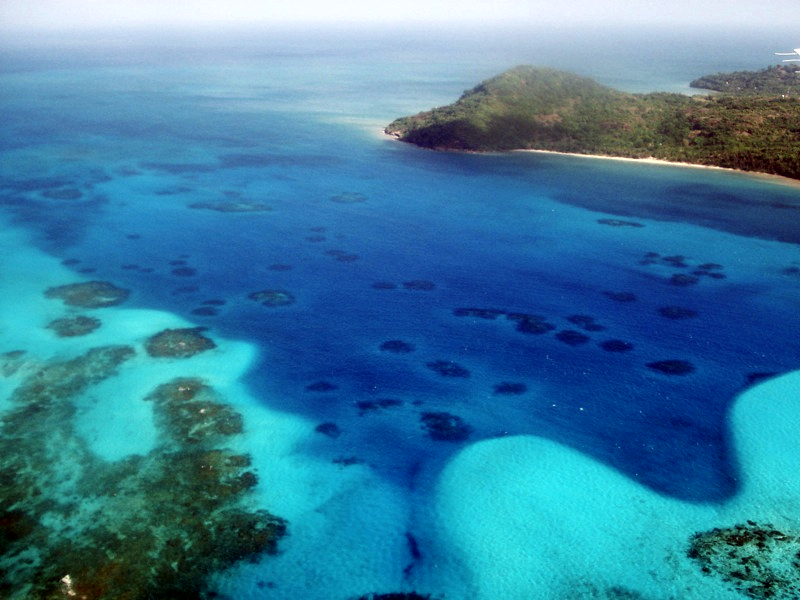 Isla Providencia, San Andres Colombia